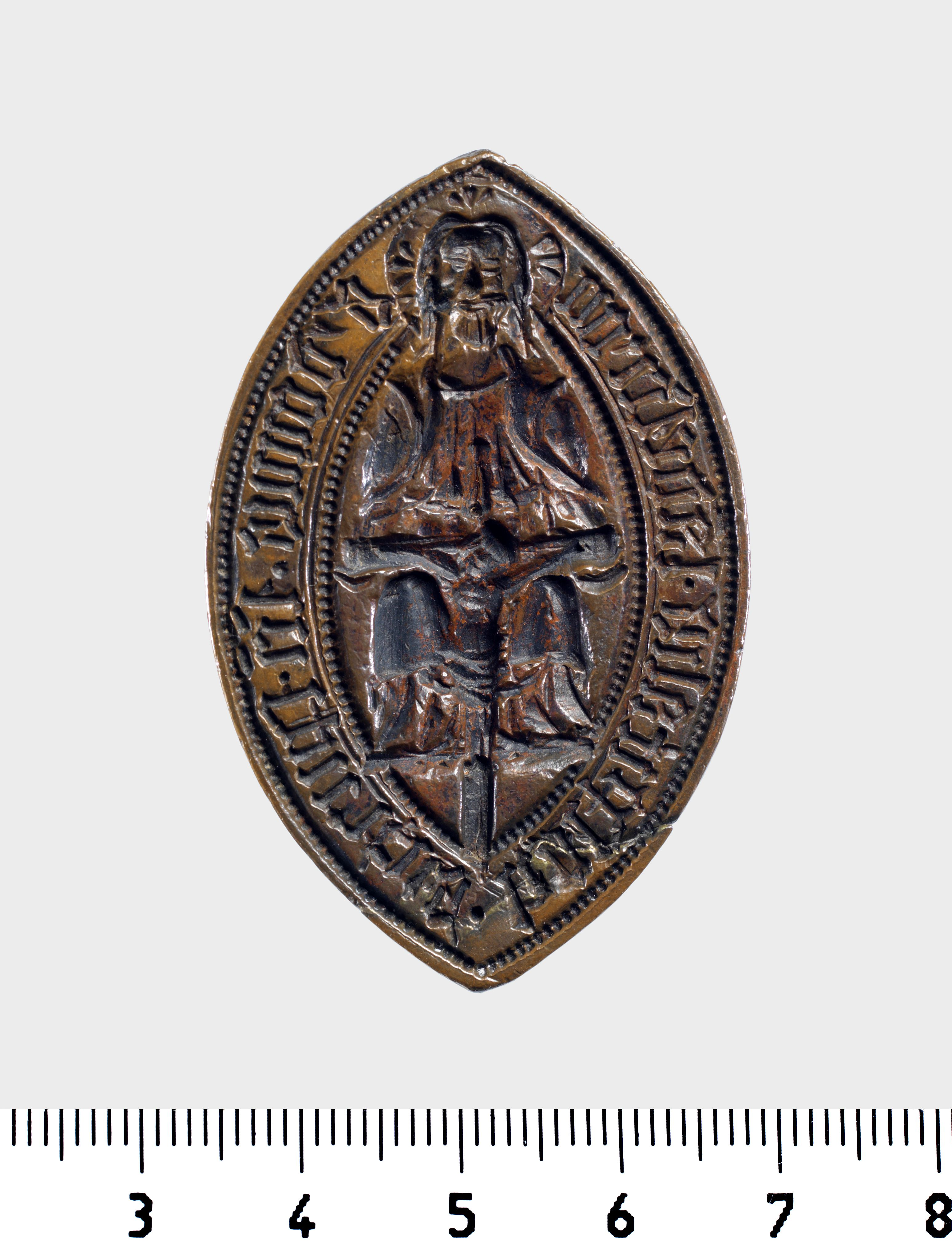 Forside af spidsoval seglstampe af bronze. Mål: 5,3 x 4,0 cm. I seglfeltet en nådesstol, Gud Fader siddende med den korsfæstede foran sig. Omskriften lyder: S DOMUS SCI SPIRITUS HOSPITALIS LADESCRON. Seglstampen stammer altså fra hospitalet i Landskrona.